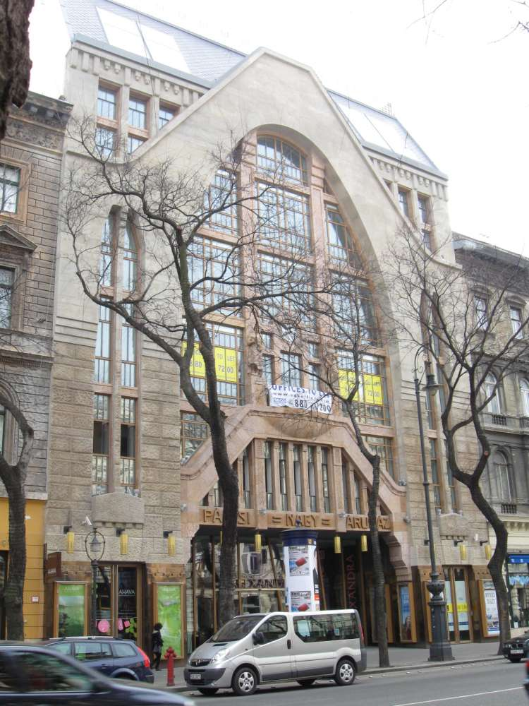 A Párizsi Nagy Áruház, korábbi nevén Divatcsarnok (Budapest, VI. ker., Andrássy út 39.)